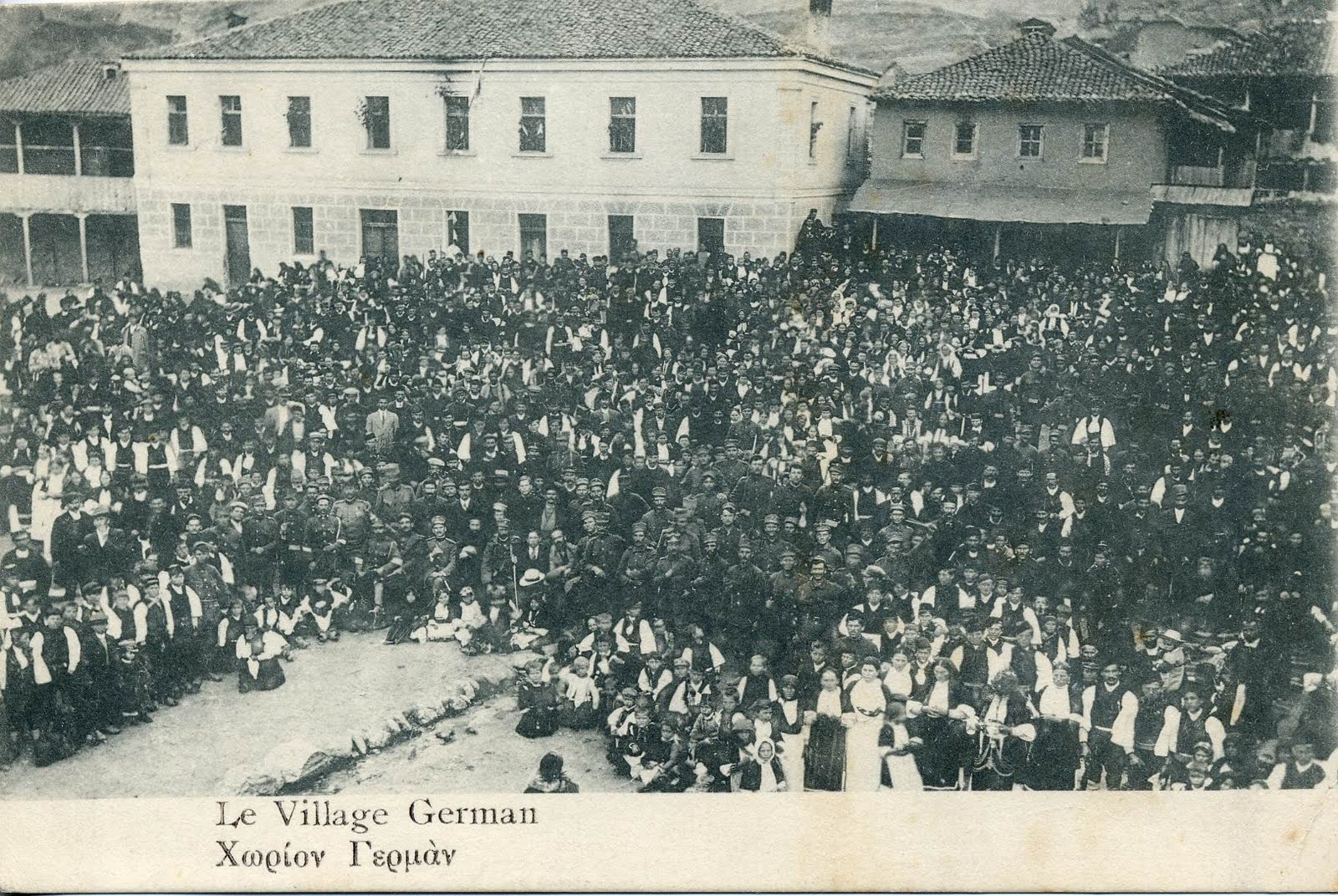 Преспанското село Герман през Първата световна война, 1918.